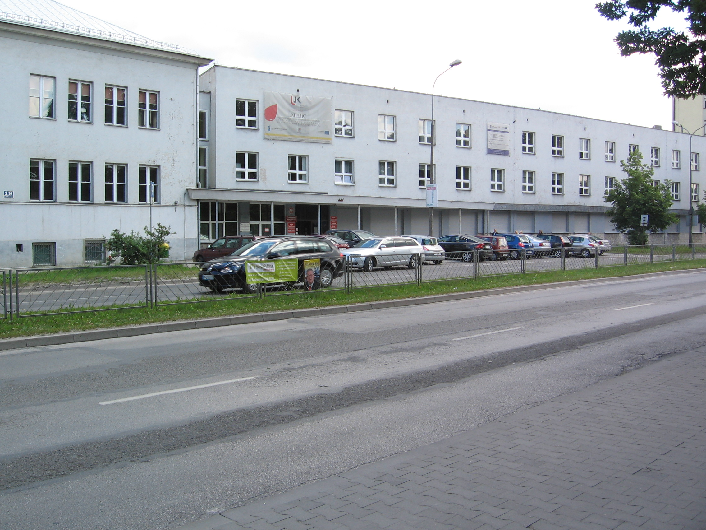 Budynek Wydziału Nauk o Zdrowiu UJK w Kielcach przy al. IX wieków Kielc, do którego uczelnia przeniosła się w 2002 roku